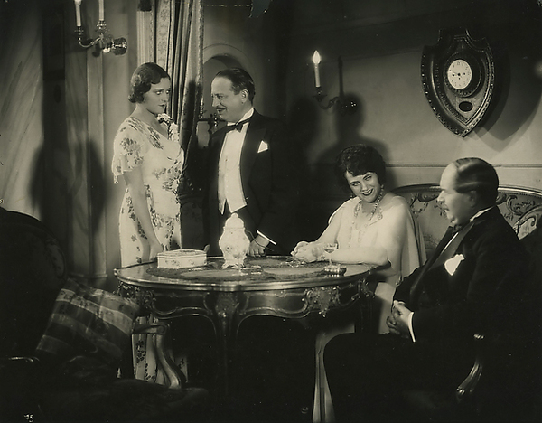 Fenyvessy Éva, Gózon Gyula, Haraszti Mici és Kabos Gyula a Hyppolit, a lakáj című filmben